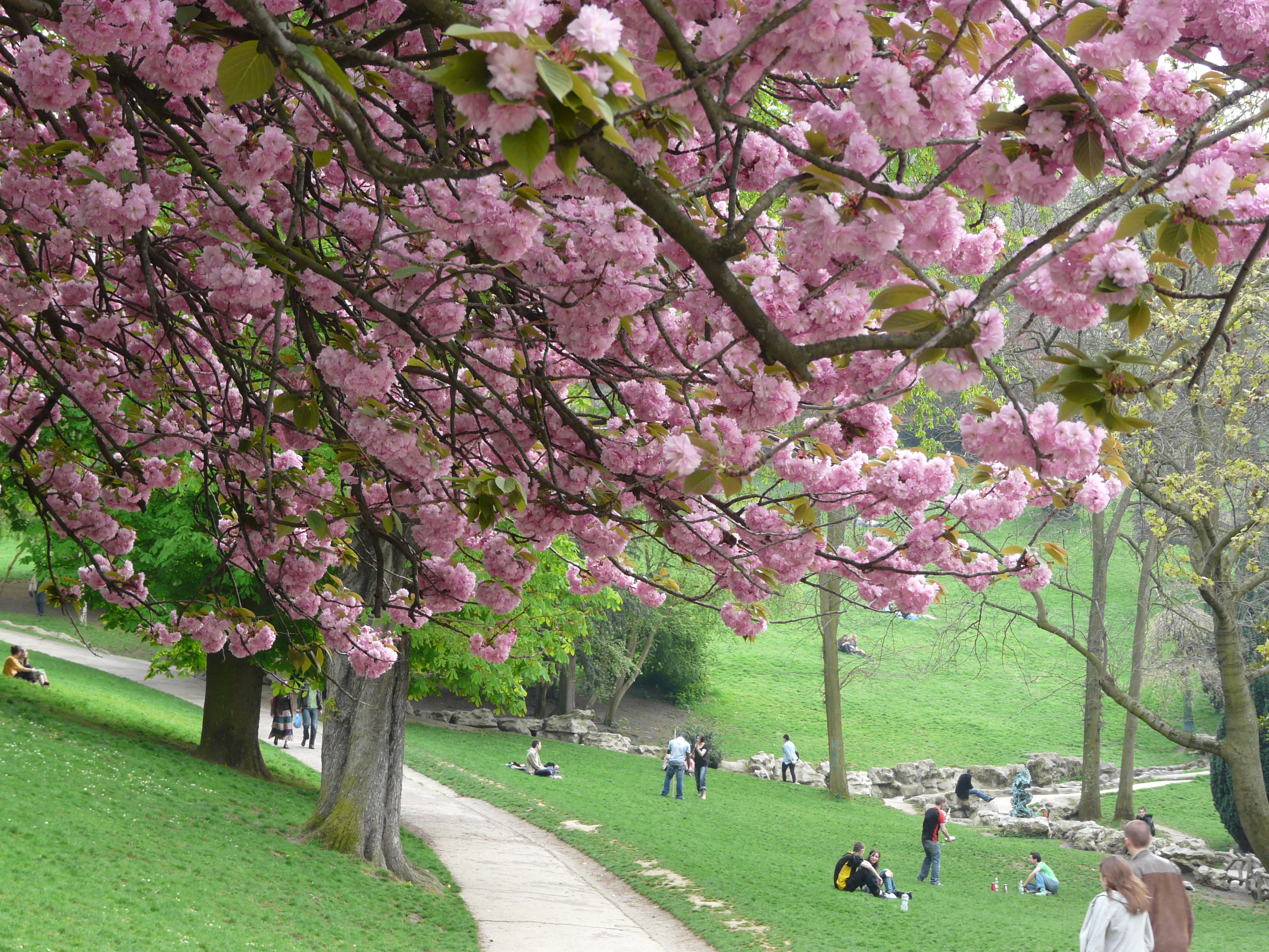 Les cerisiers en ce mois d'avril sont toujours source de réjouissance. Ils annoncent enfin l'arrivée du printemps et cette couleur rose me remplit d'espoir et de joie. Cela m'évoque un extrait d'un texte sur l'harmonie : "L'harmonie n'exerce pas de contrôle. C'est une relation entre être autonomes. Les cerisiers, les pêchers, les pruniers donnent tous des fleurs différentes. Ces différences font leurs beauté." Photos prises aux Buttes-Chaumont, Paris, France.